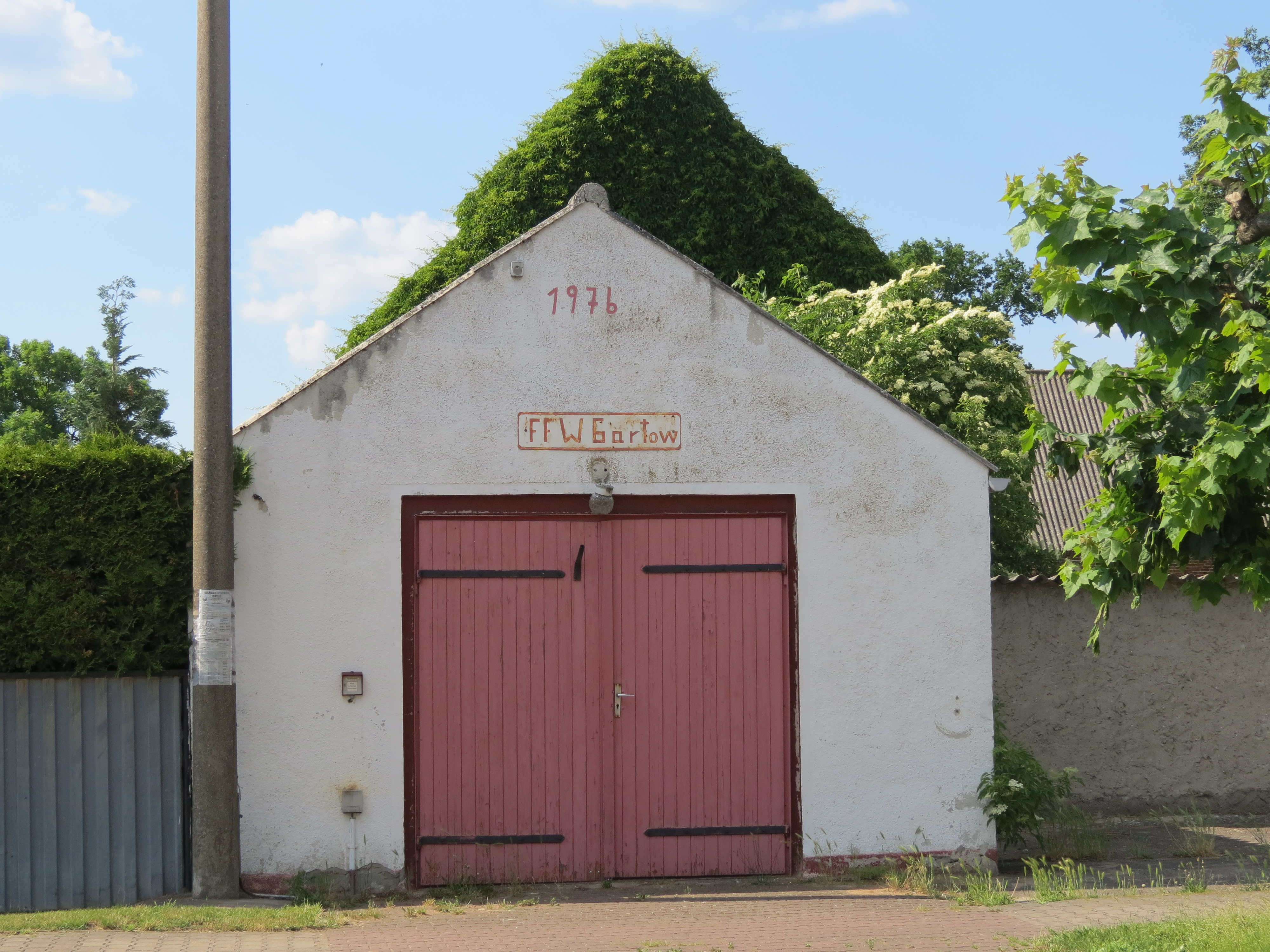 Feuerwehrhaus in Gartow, OT der Gemeinde Wusterhausen, Landkreis Ostprignitz-Ruppin, Brandenburg, Strassenseite